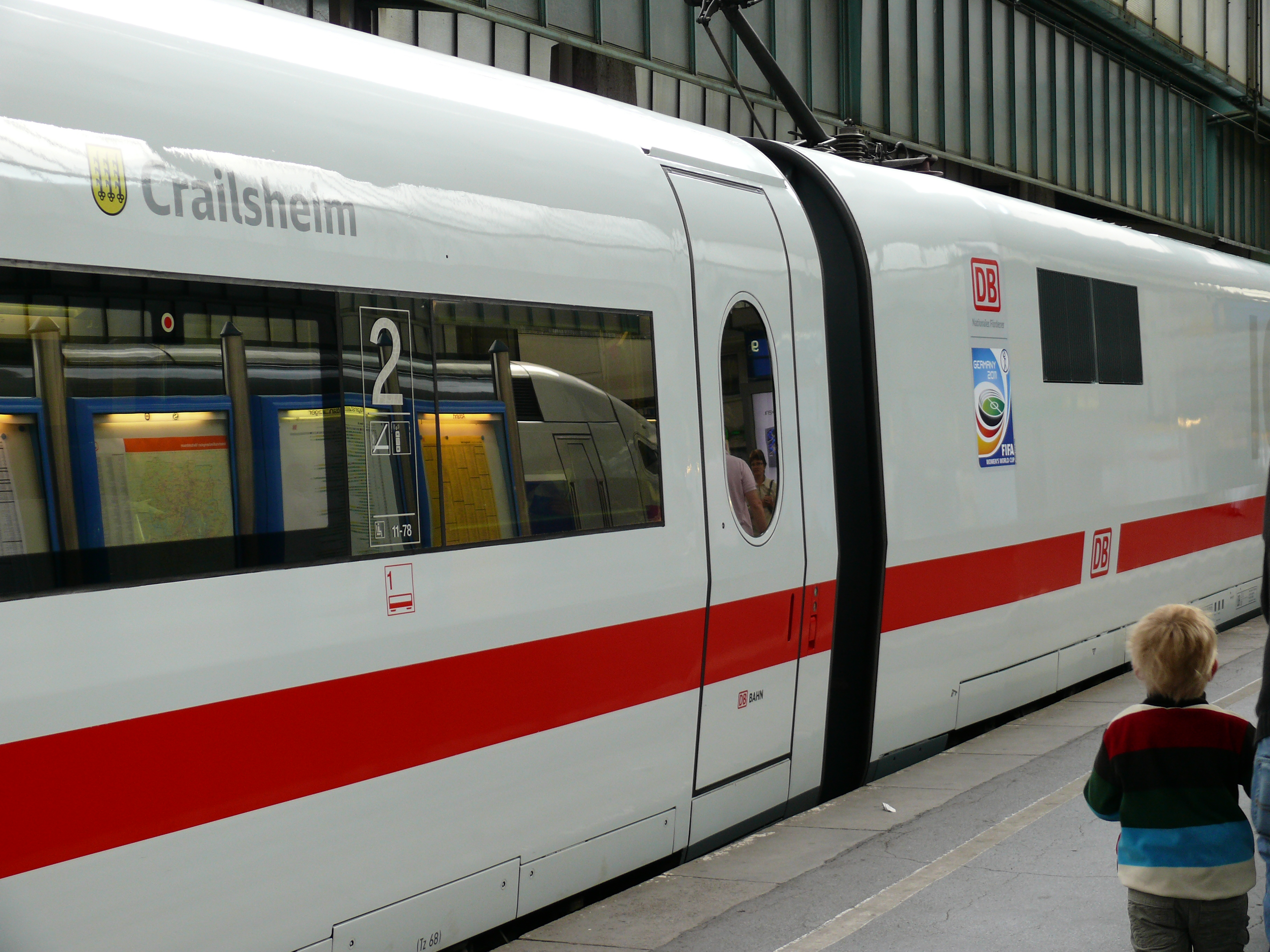 ICE1 der auf Crailsheim getauft wurde.